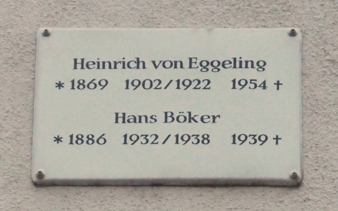 Tafel für den Anatomen und Zoologen Hans Böker (1886-1939) in Jena, Teichgraben 7